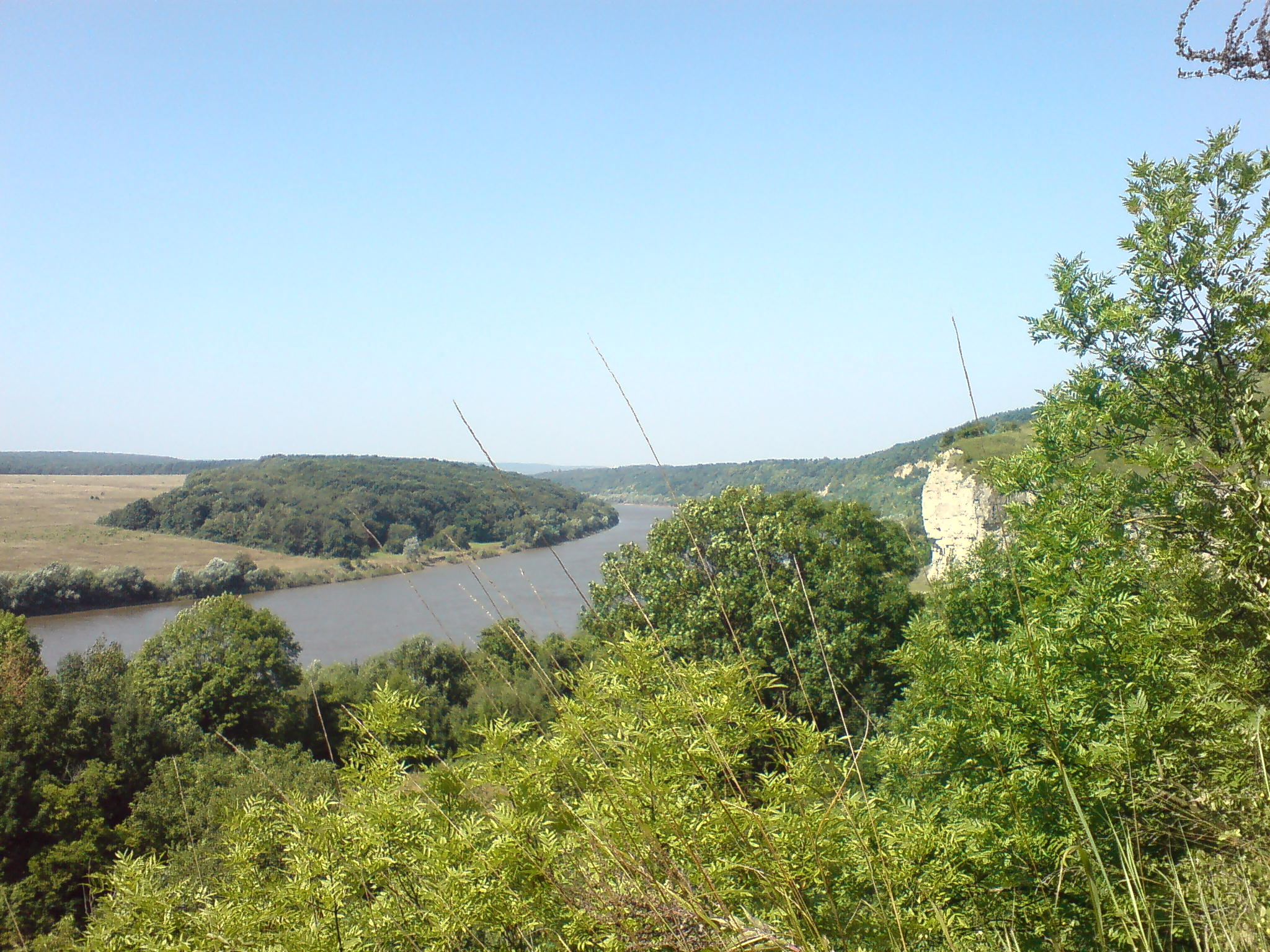 Вид на річку Дністер. село Дзвенигород.